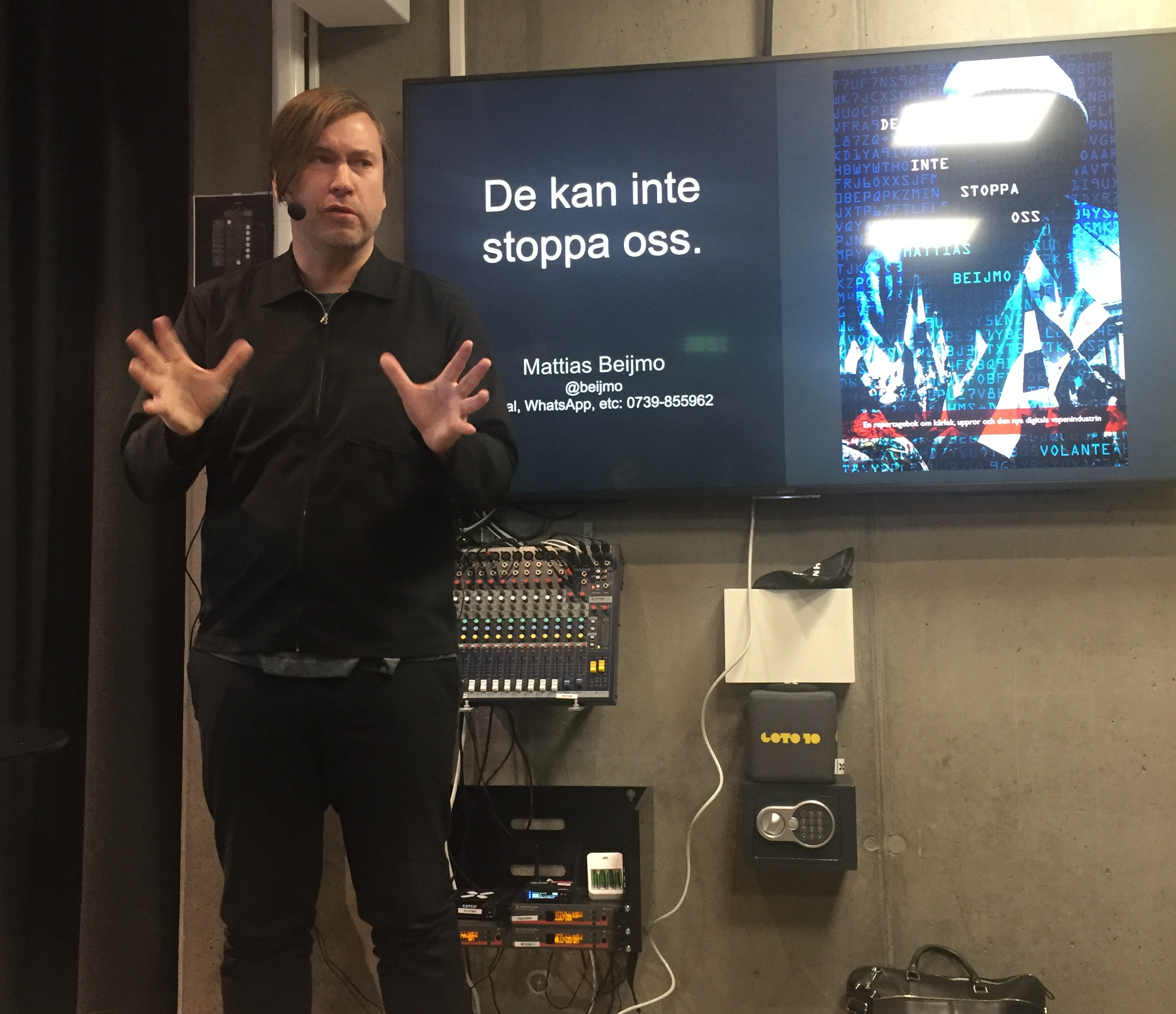 Mattias Beijmo